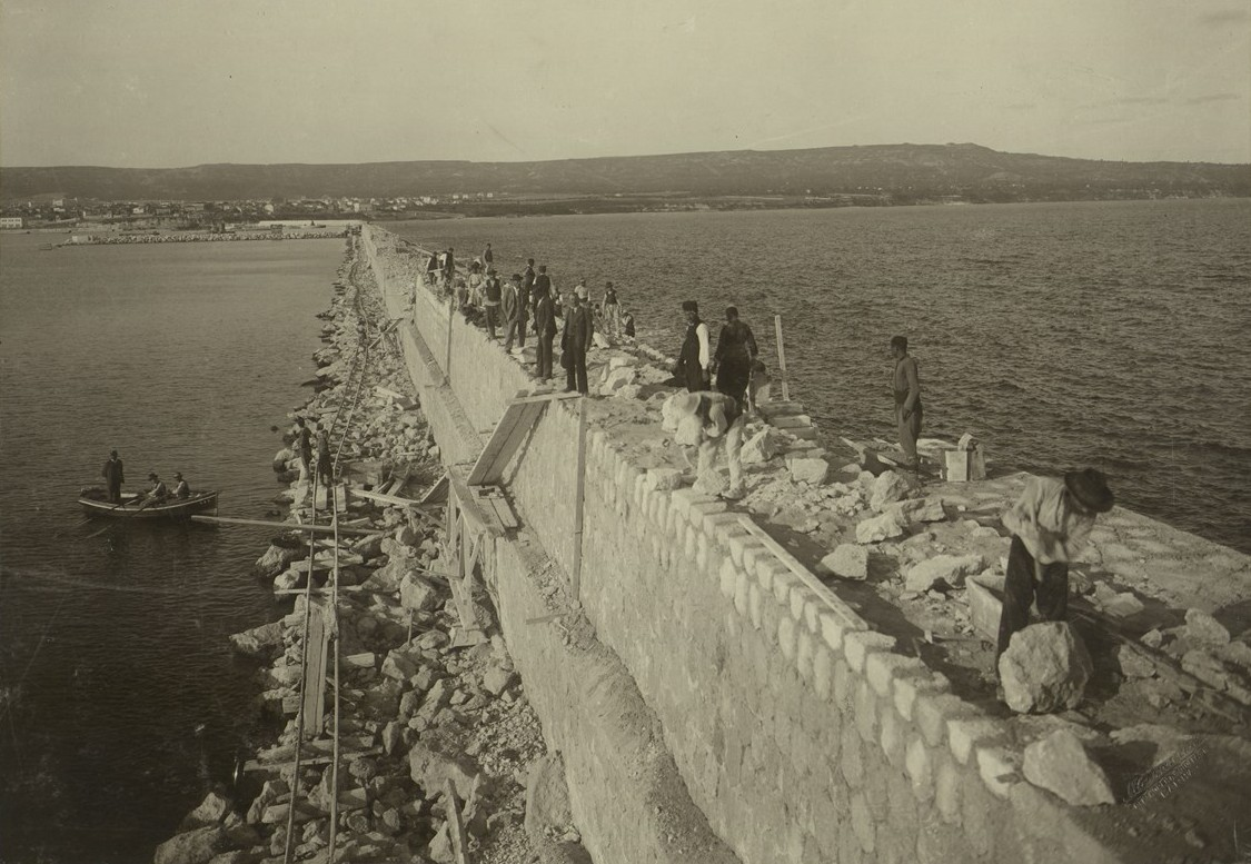 Работници по време на строежа на главния вълнолом на Пристанище Варна, на заден план - част от град Варна.